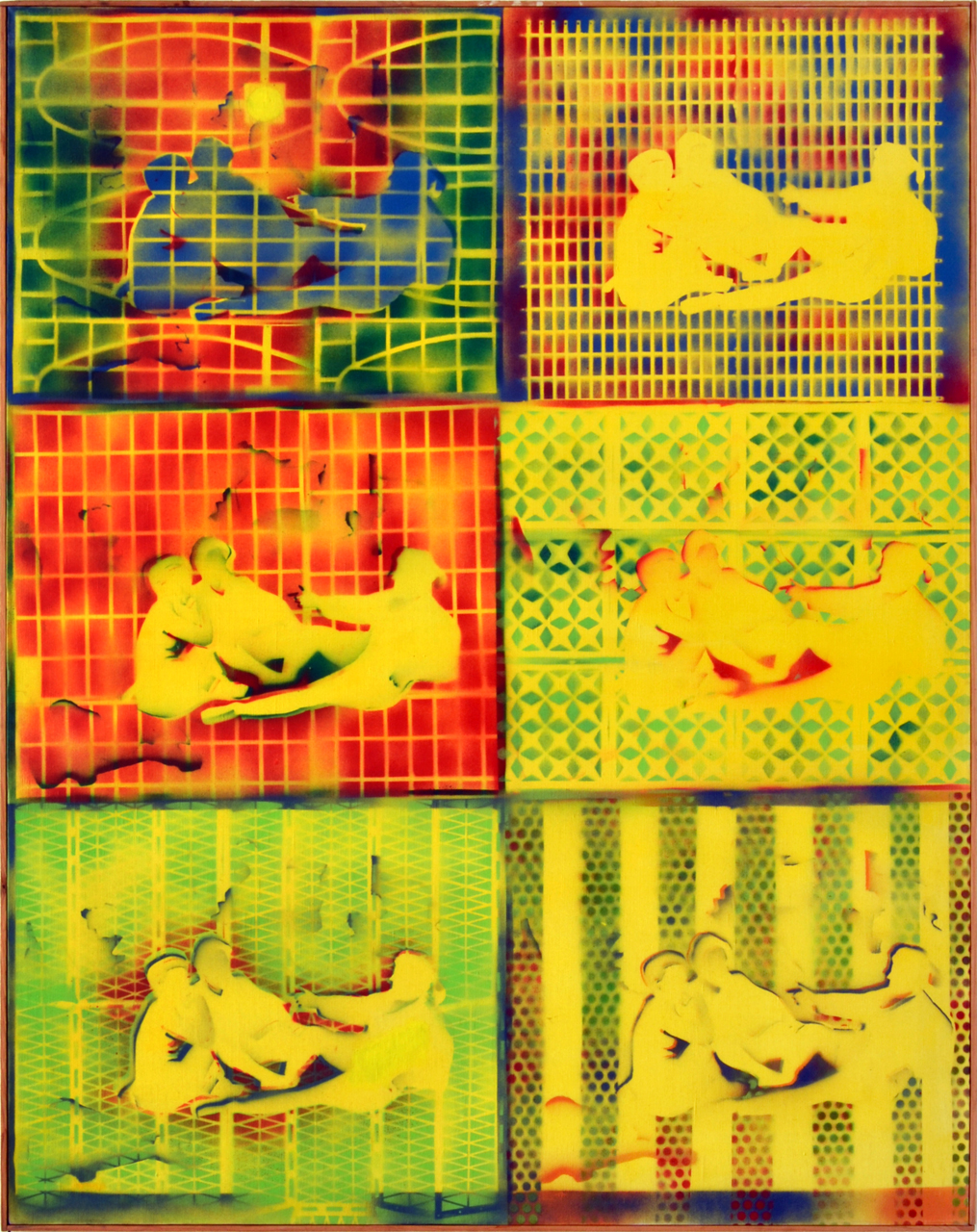 Rudolf Němec, Vzpomínka na Maneta (1983), akryl, email, plátno